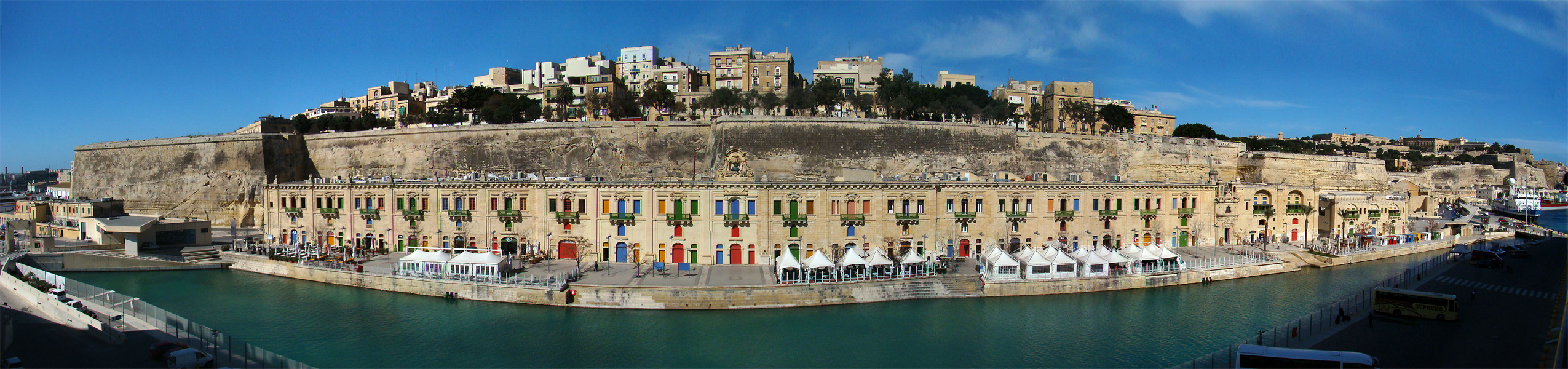 Malti: Valletta Waterfront in Floriana (NOT Valletta!), Malta.